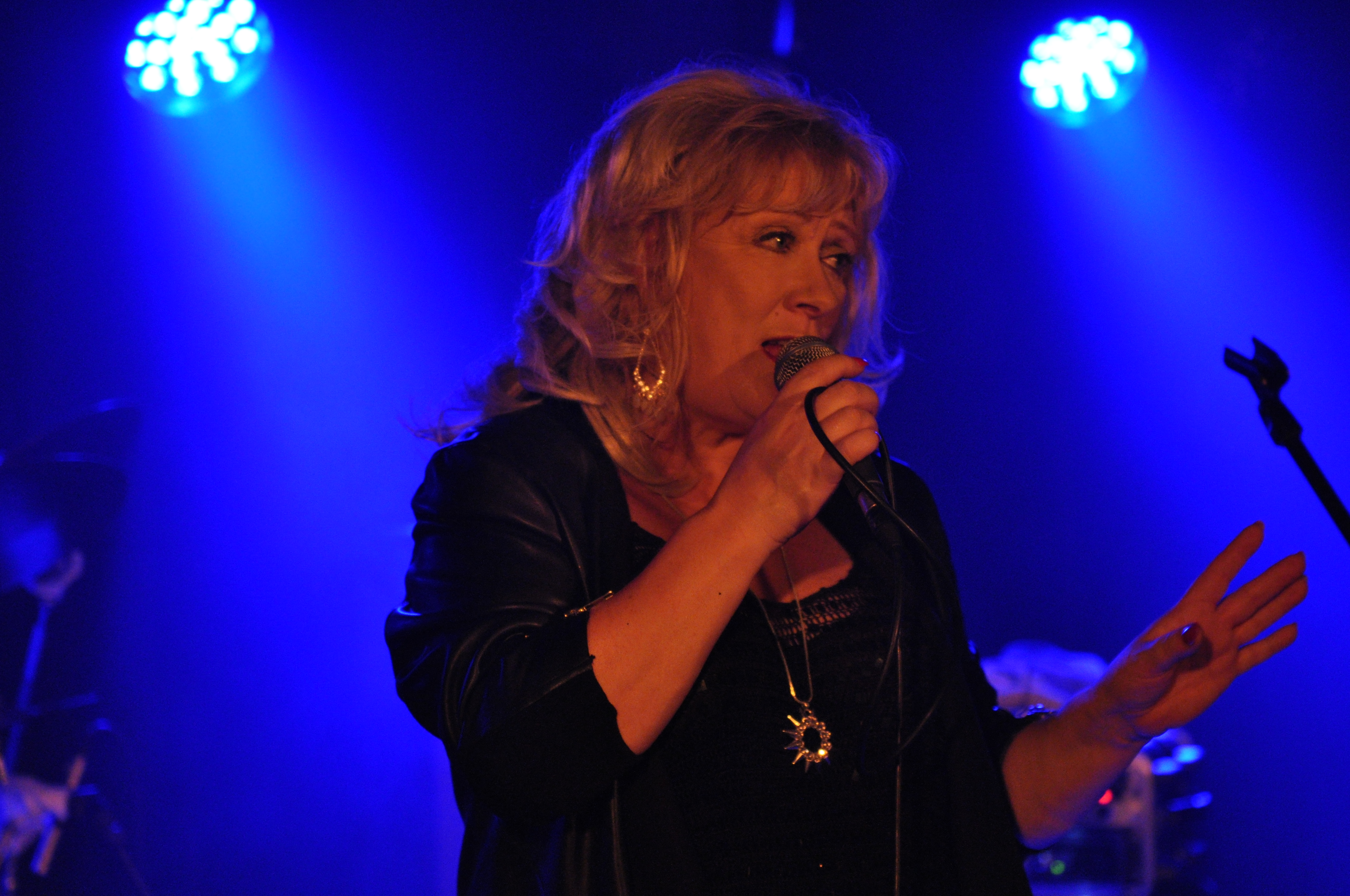 Shakatak am 19. September 2014 im Live Club Barmen in Wuppertal